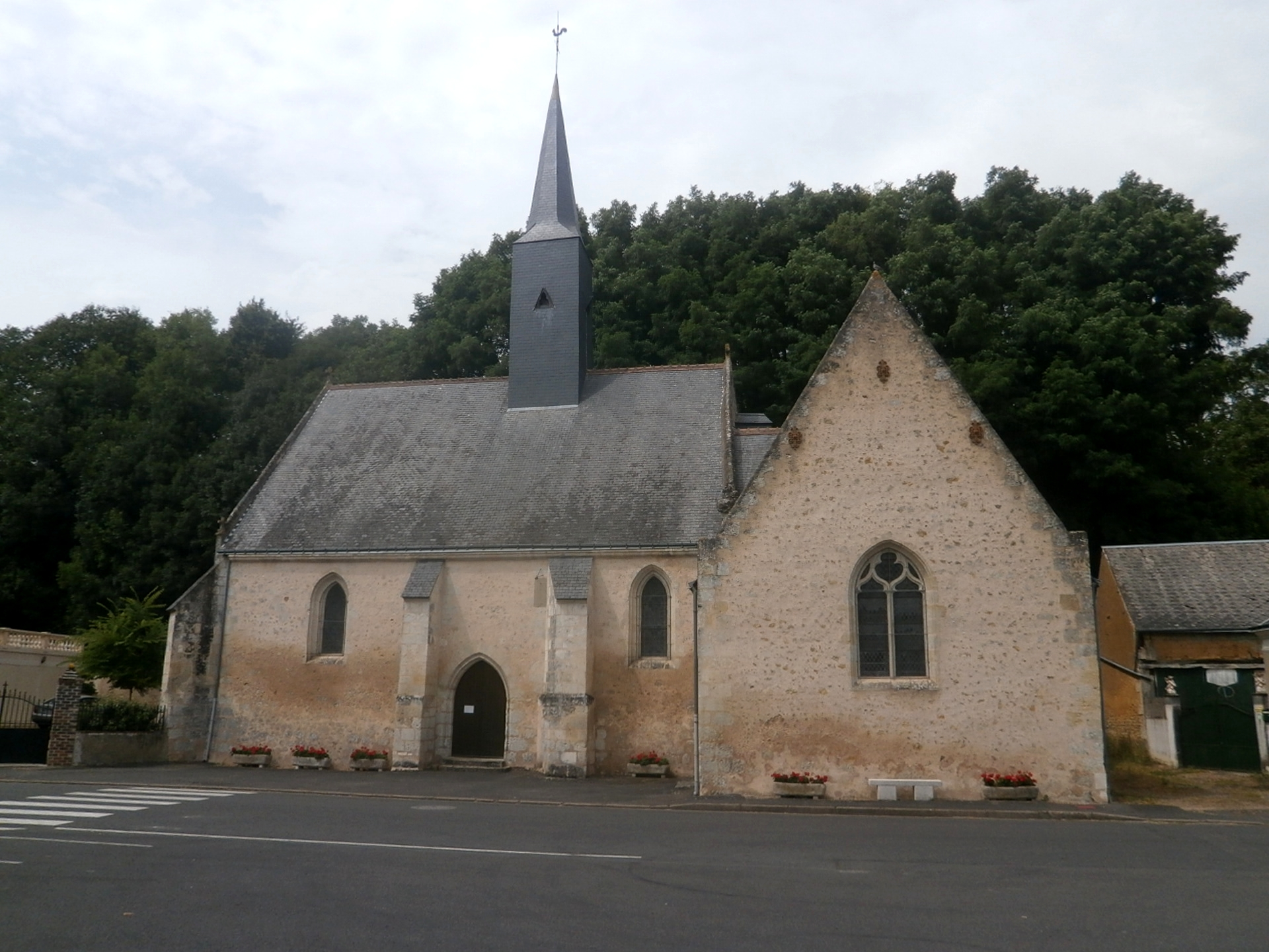 L'église des Hermites